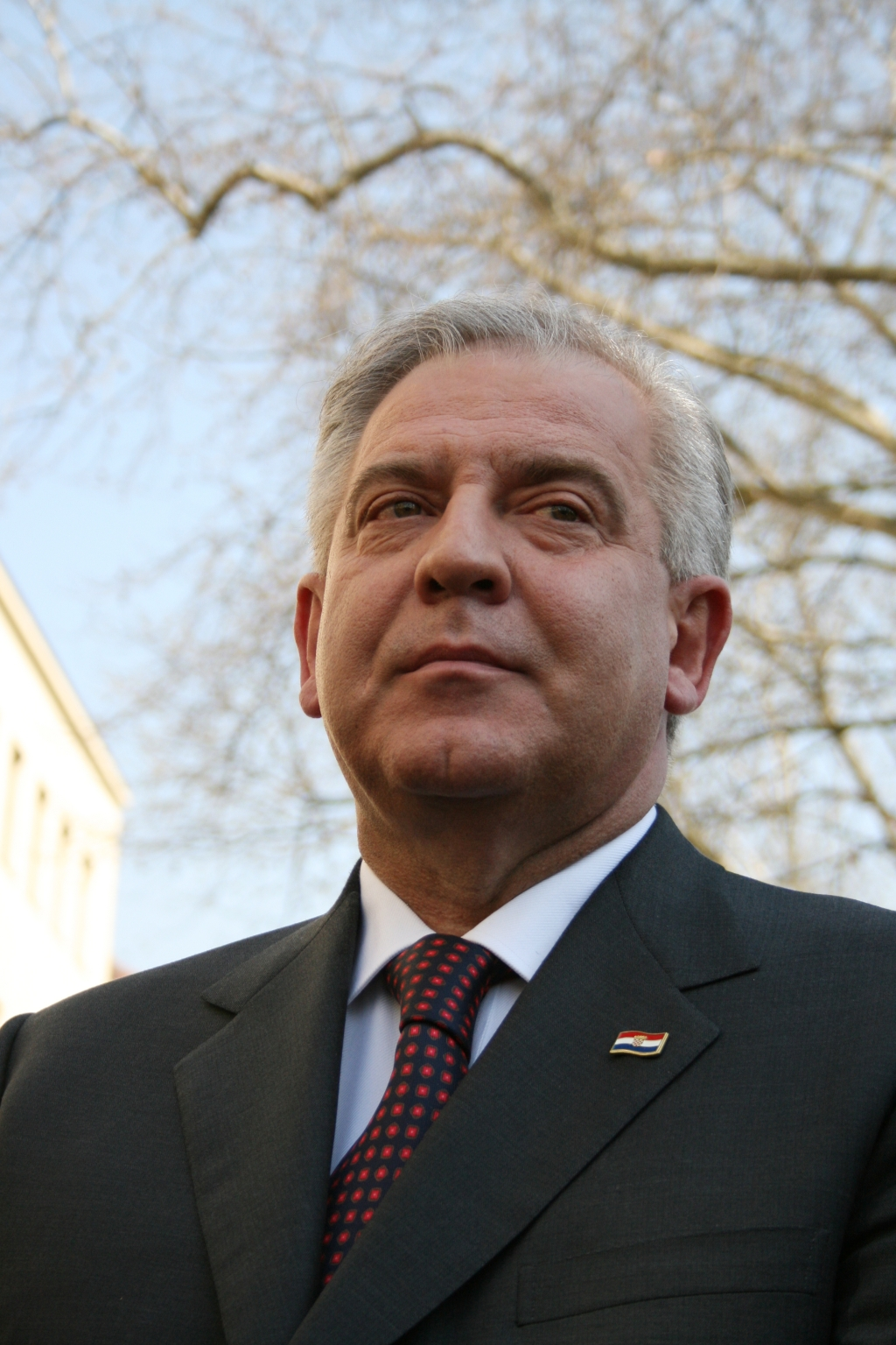 Ivo Sanader na svečanosti podizanja NATO-ve zastave ispred zgrade MORH-a u Zagrebu.